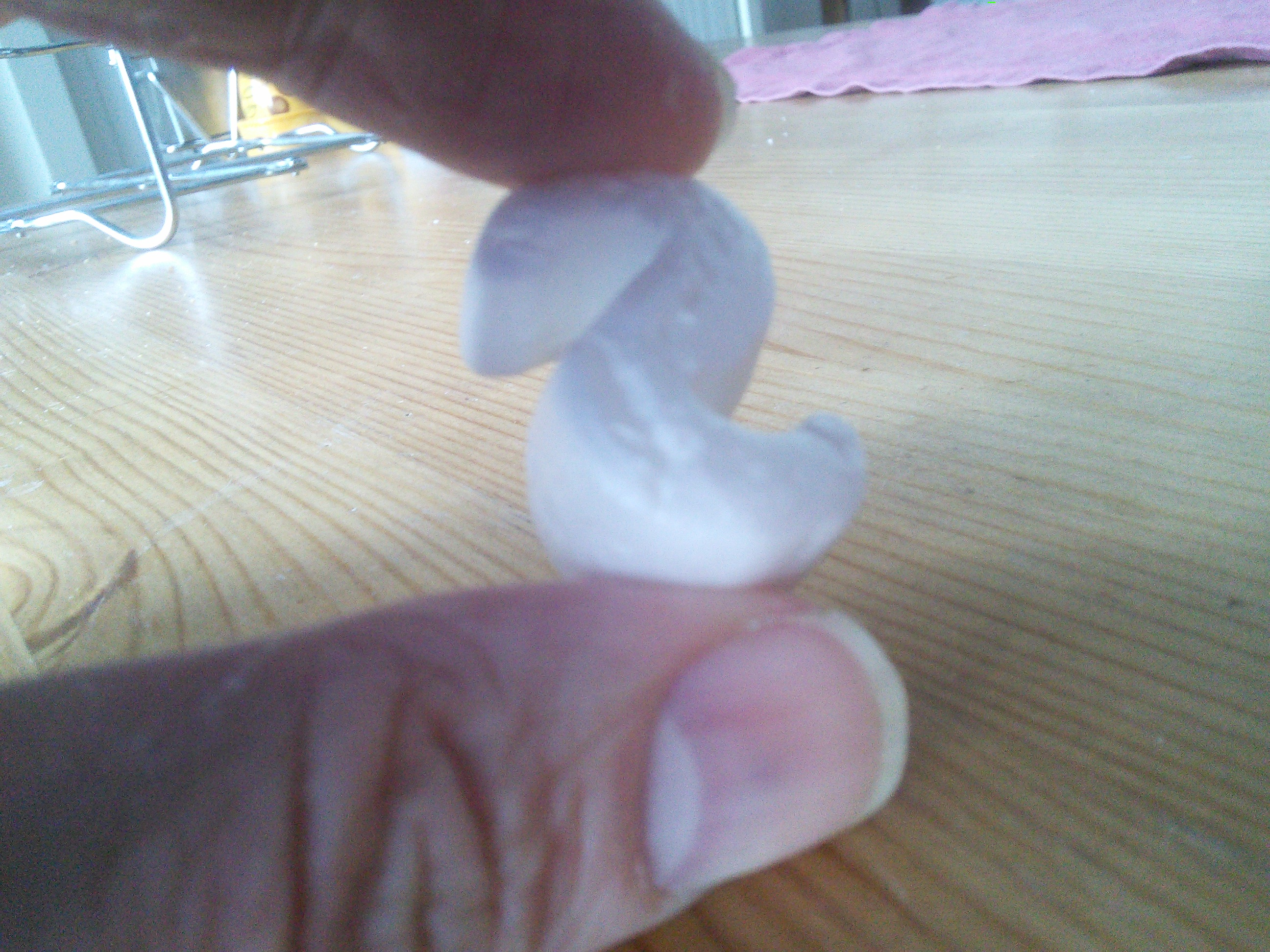 Packing material